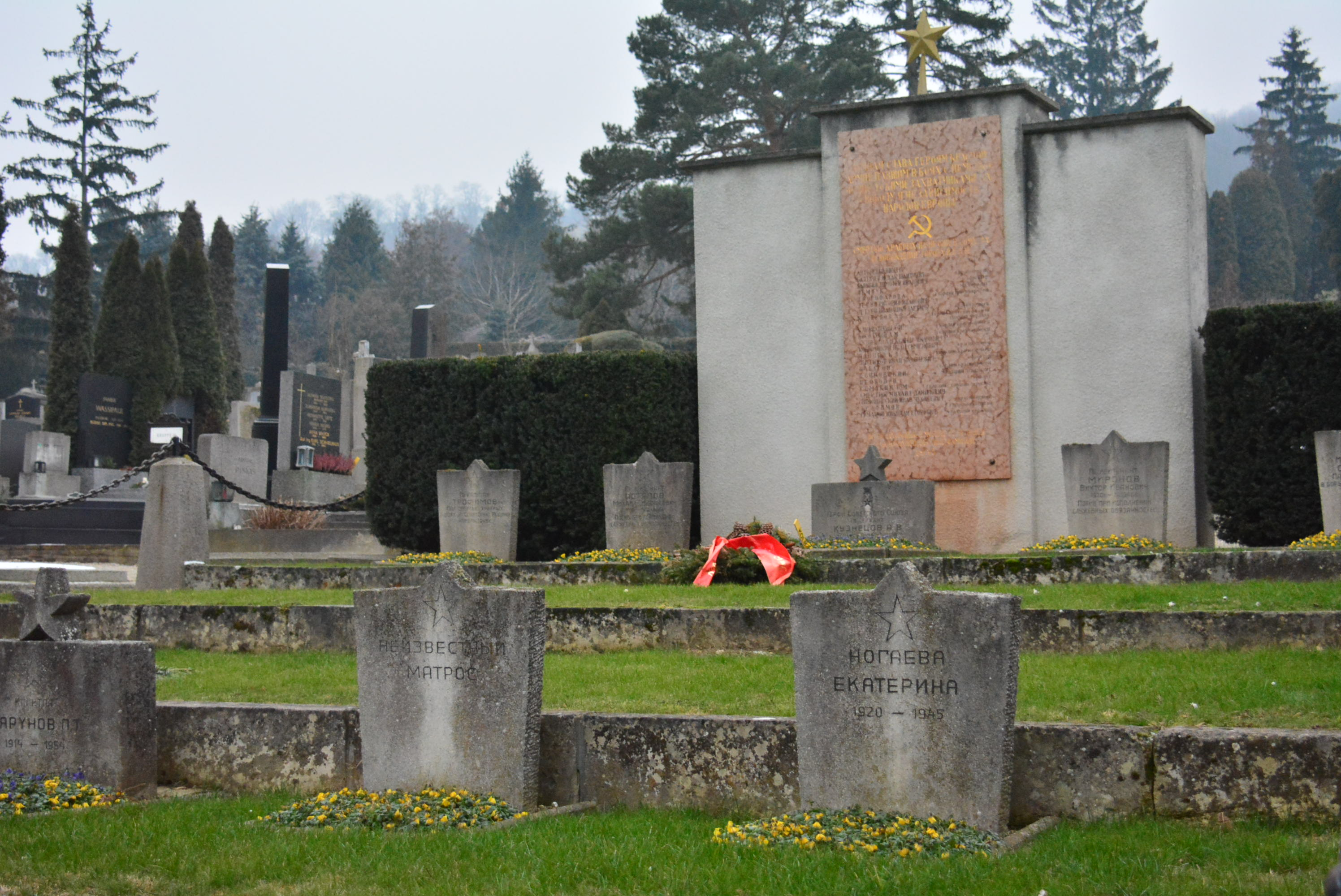 Russischer Soldatenfriedhof auf dem Oberen Stadtfriedhof in Klosterneuburg (Niederösterreich) (oberer Friedhofsteil)